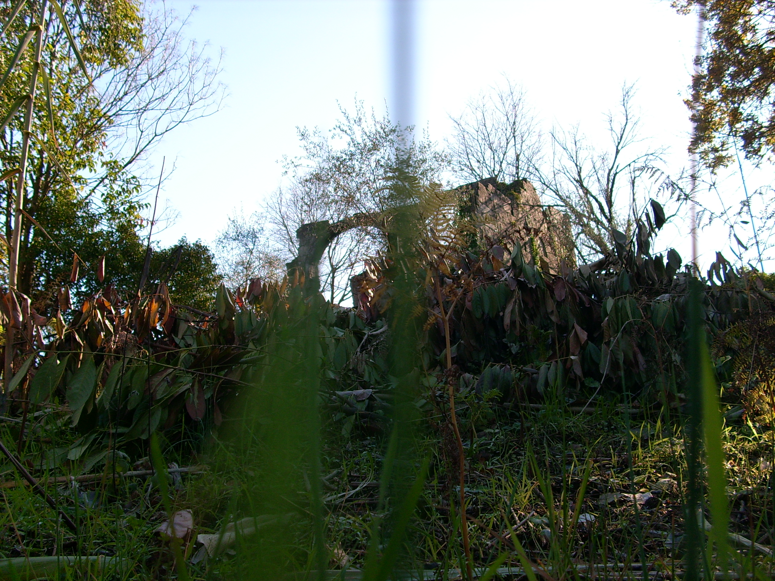 Ruderi del cenobio di San Tommaso presso Santa Maria del Campo (Rapallo), Liguria, Italy